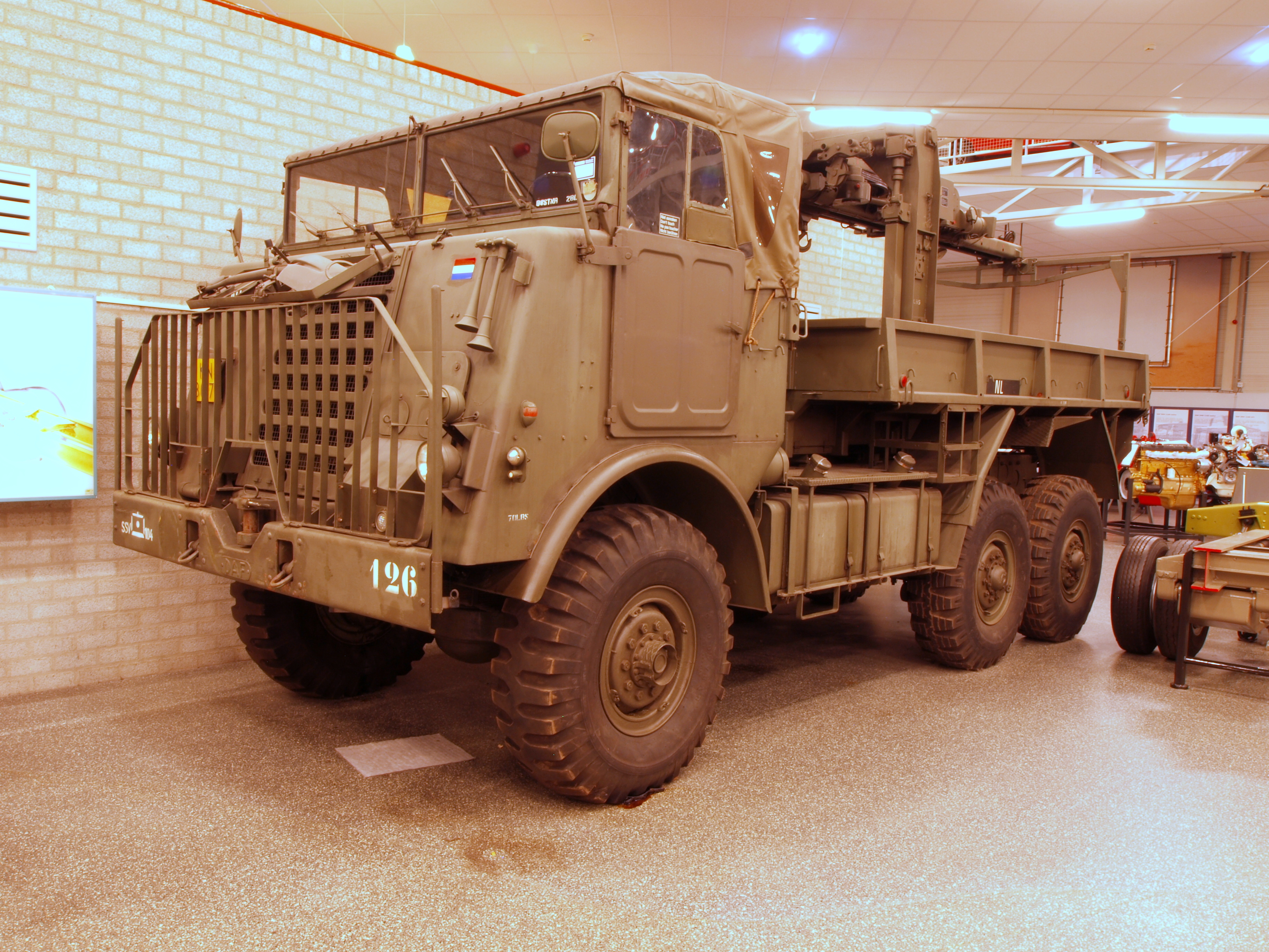 DAF museum